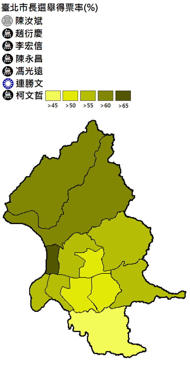 因連未在任何行政區中勝出，故將連的藍色去除